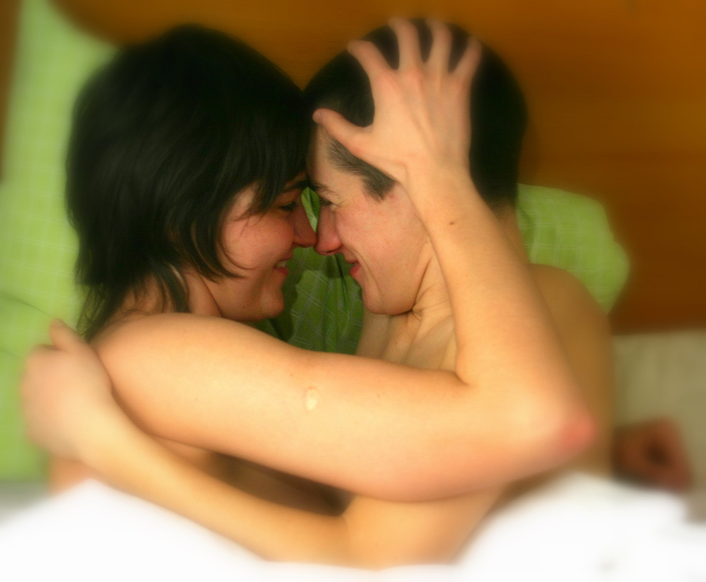 Lesbisches Zärtlichkeit im Bett